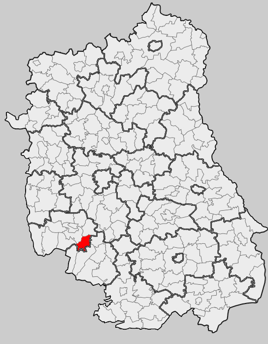 Map of gmina Szastarka, Kraśnik county, Lublin voivodship Mapa gminy Szastarka, powiat kraśnicki, województwo lubelskie